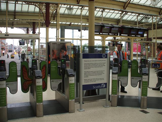 Ayr station ticket barriers